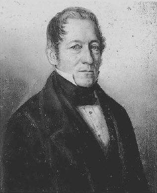 Johann Michael Scheffelt 1795-1853; Ausschnitt aus einer Fotografie eines Ölgemäldes